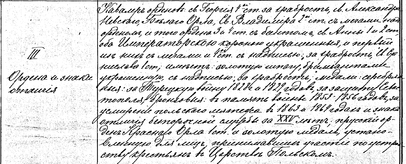 Награды К.А.Бельгарда из формуляра 1868 г.